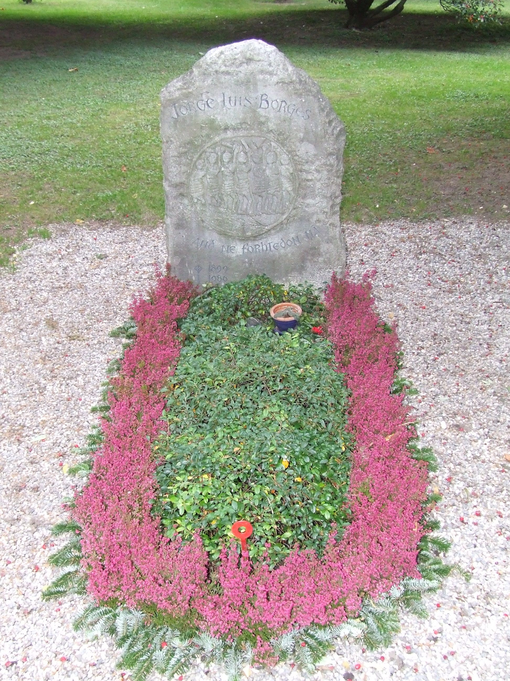 Tumba de Jorge Luis Borges en el cementerio de Plain Palais, Ginebra.